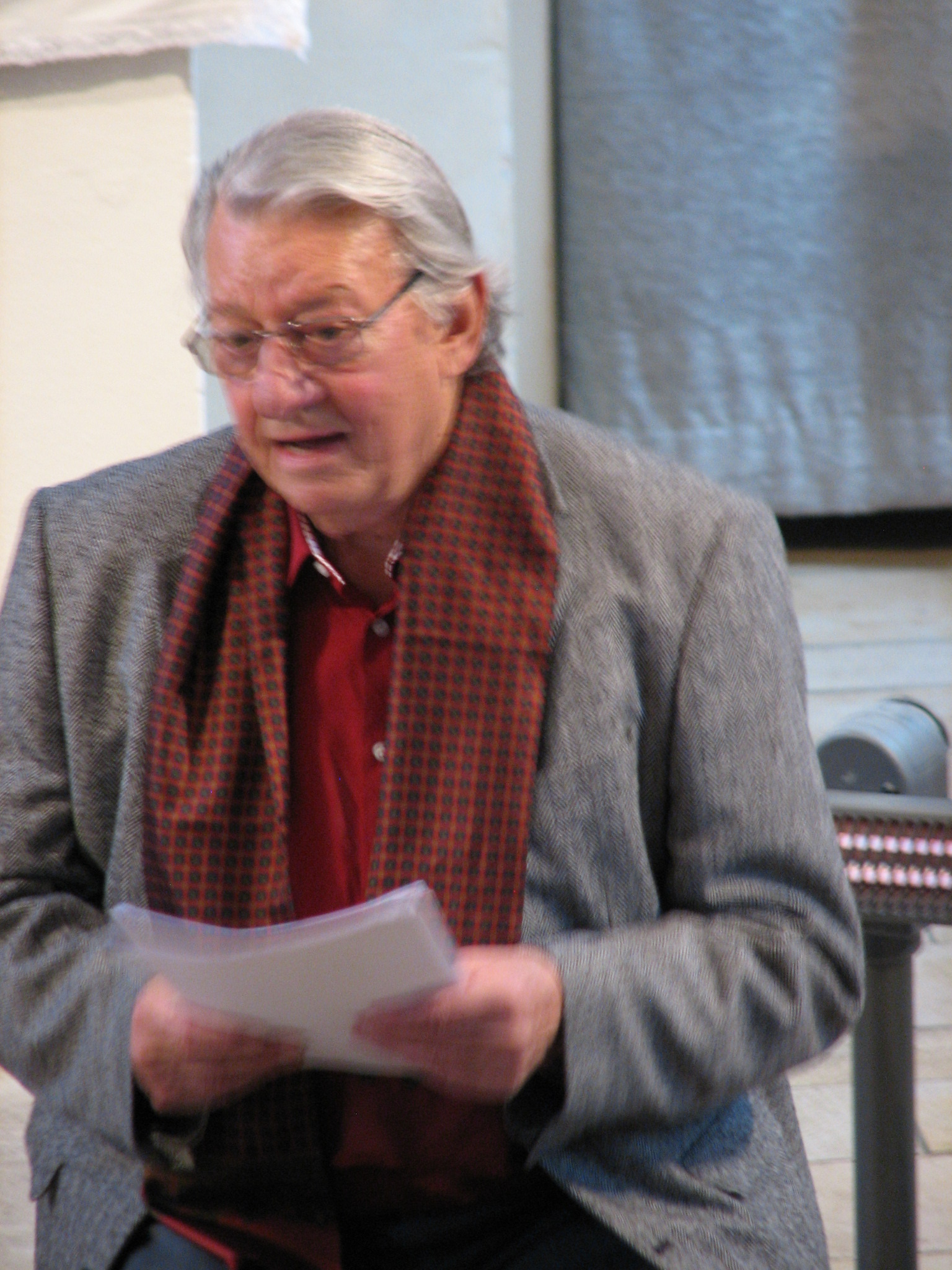 Friedhelm Eberle (18. November 2018, Kirche Panitzsch)